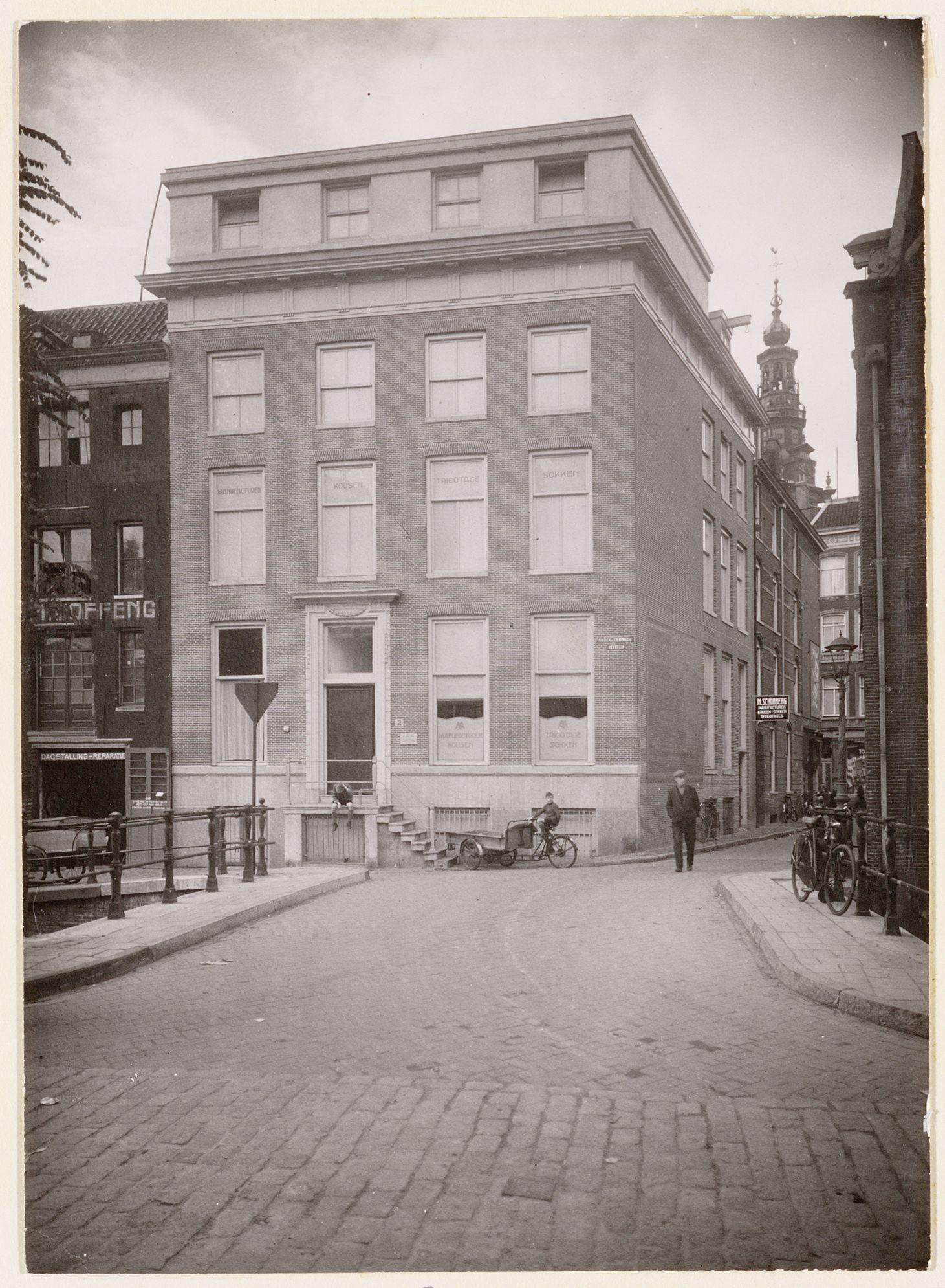 Beschrijving Snoekjesgracht 2-4 (v.r.n.l.), hoek Snoekjessteeg Op de voorgrond een deel van de Snoekjesbrug (Brug 289). Op de achtergrond een deel van de Zuiderkerkstoren, Zandstraat 17. Documenttype foto Vervaardiger Onbekend Anoniem Collectie Archief van het Bureau Monumentenzorg: glasnegatieven en negatiefloze foto's Datering november 1938 Geografische naam Snoekjessteeg Snoekjesgracht Inventarissen Afbeeldingsbestand 012000001581